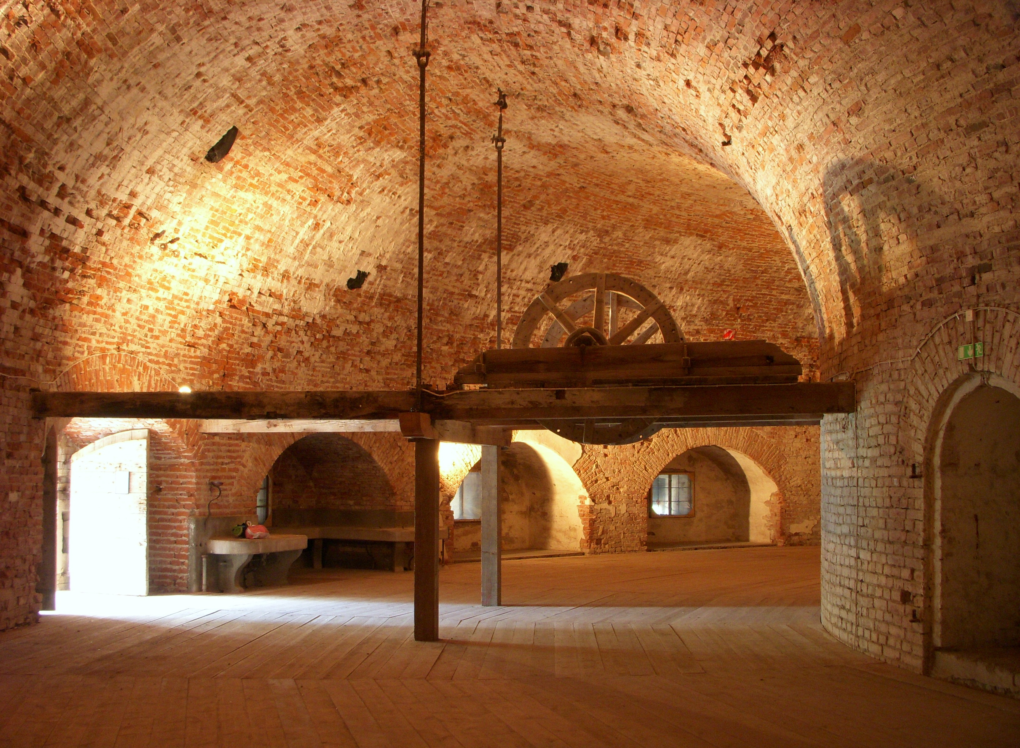 Fredriksborgs fästning, interiör, huvudentrén och maskineriet för vindbryggan